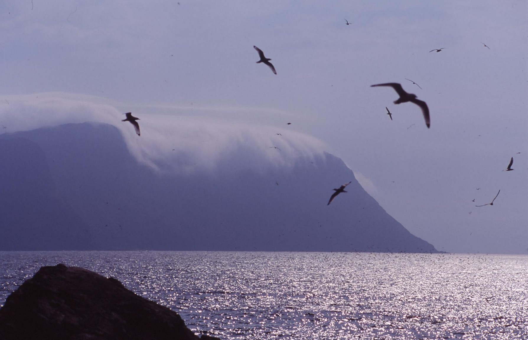 Stadt, picture taken from Runde